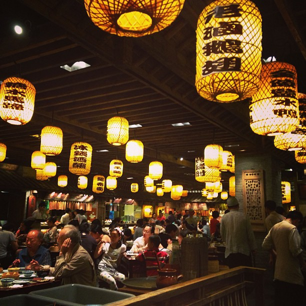 夜宵